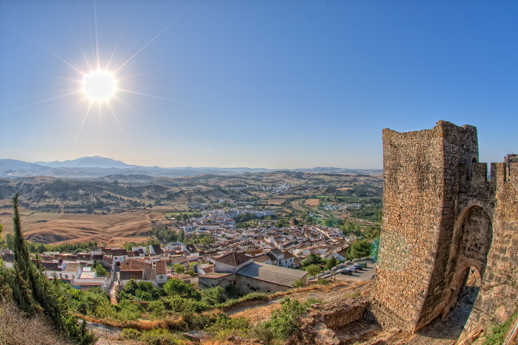 Castillo de Jimena, Cadiz